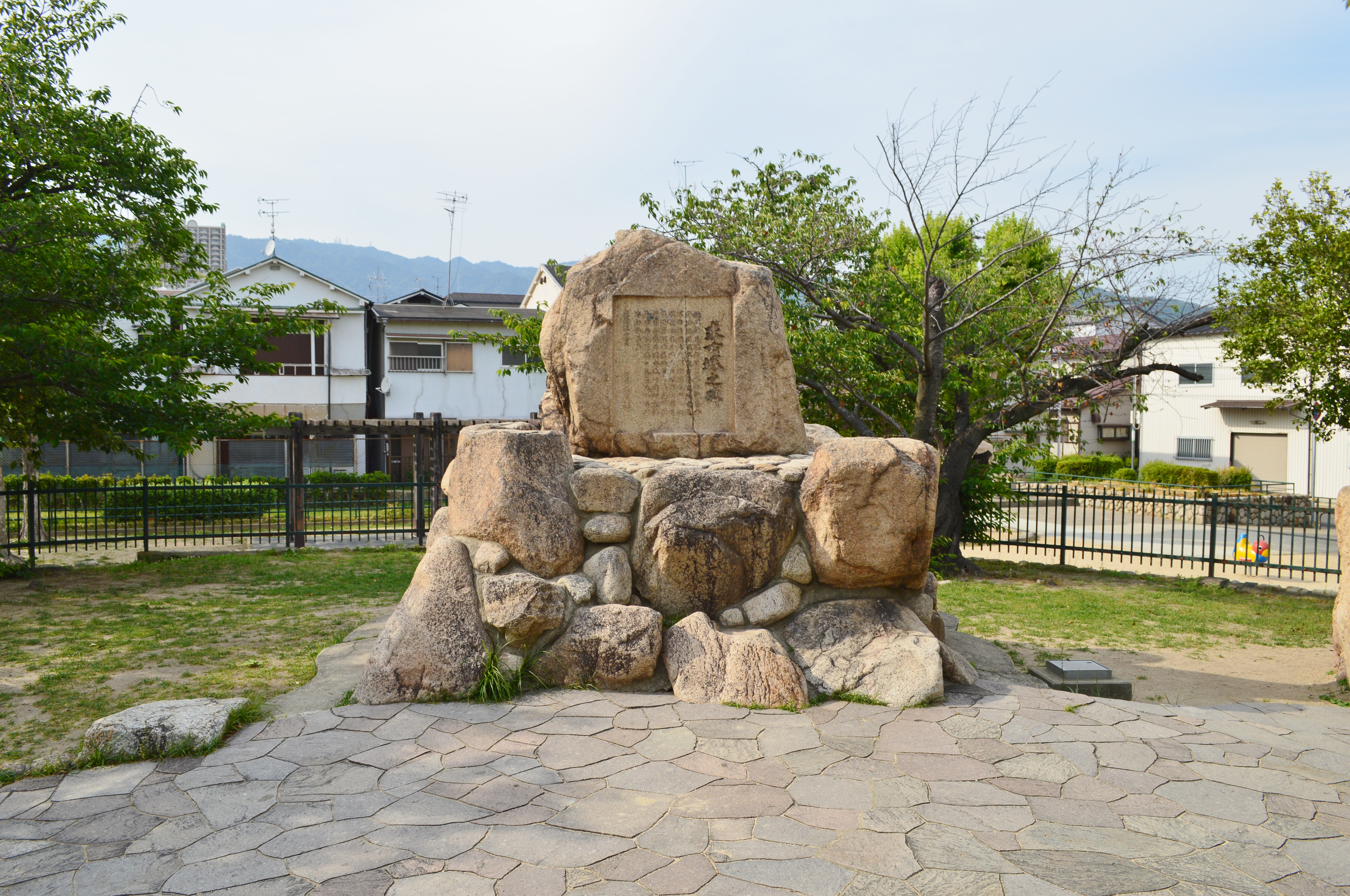 東求女塚古墳 石碑